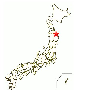 Dotmap of Misawa AB, Japan